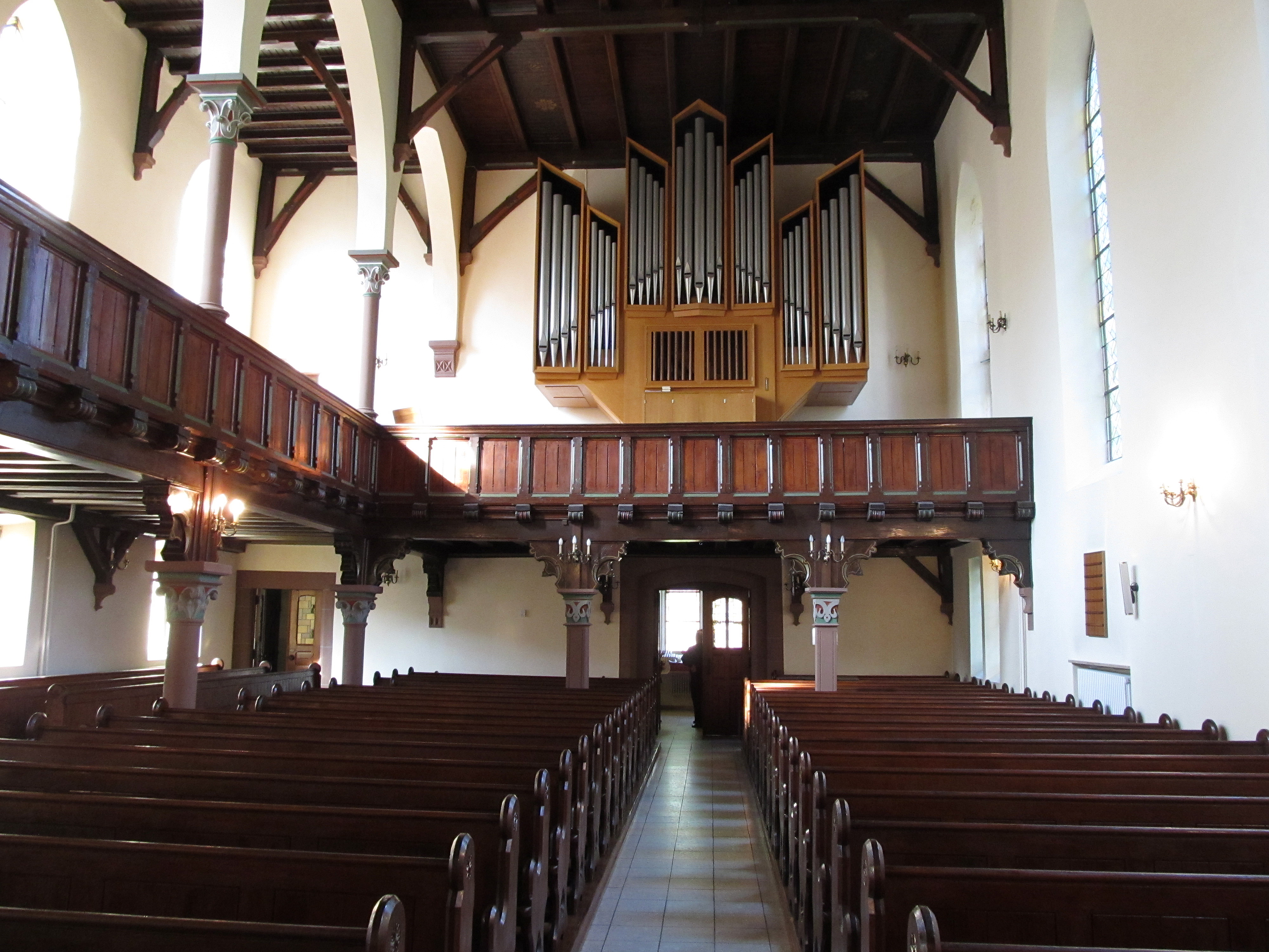 Blick ins Innere der Evangelischen Kirche in Sulzbach, Saarland